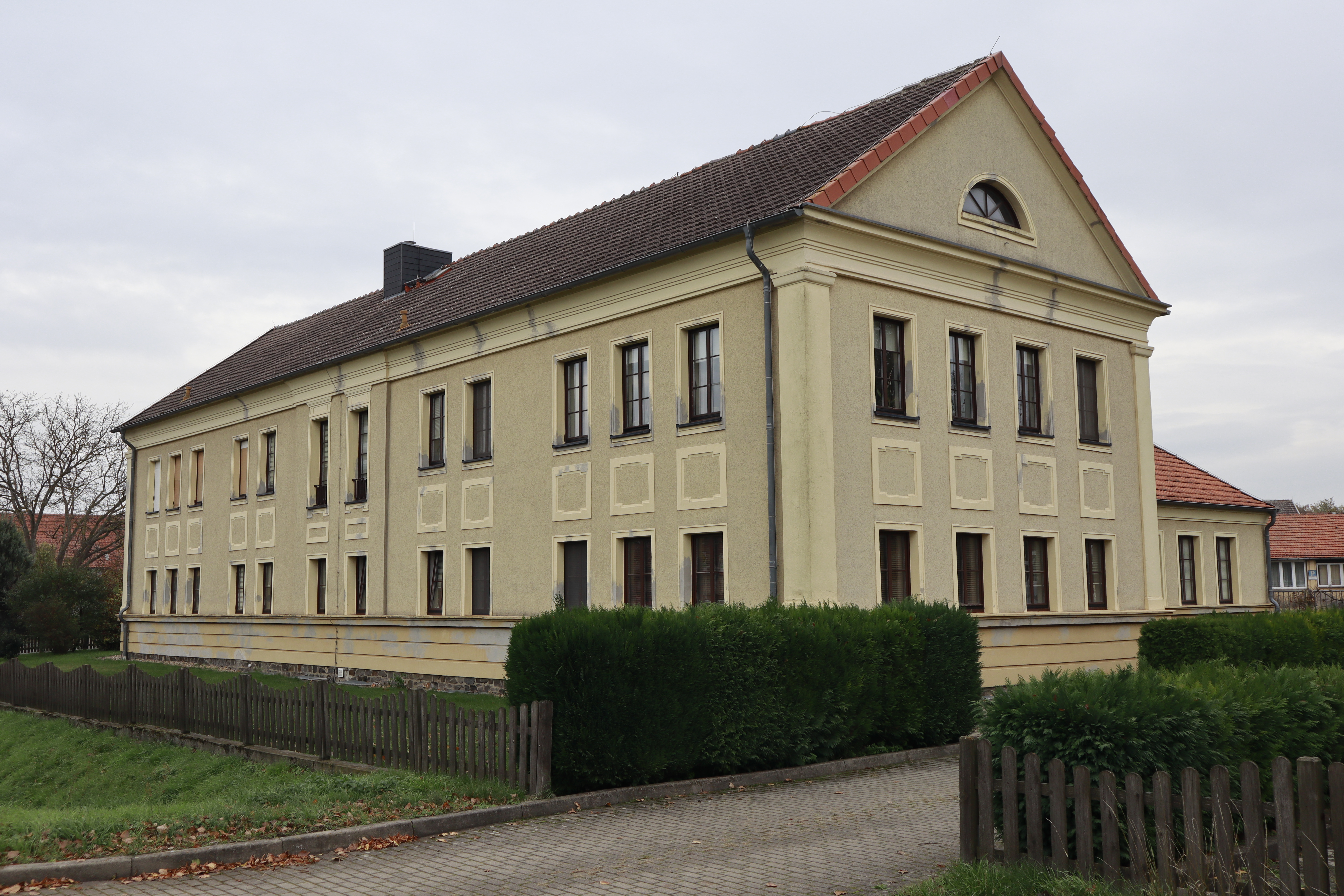 Althaldensleben, MTS